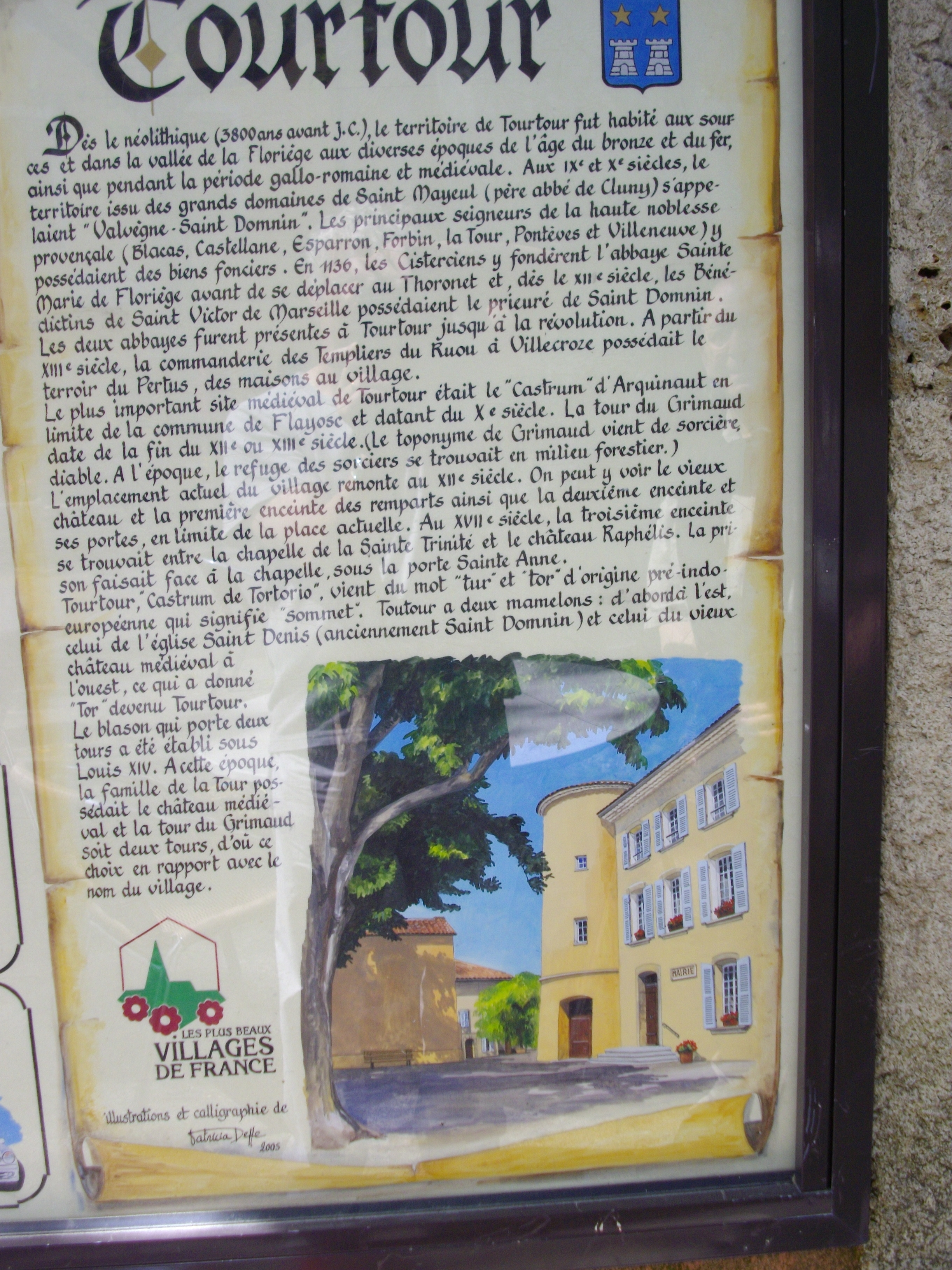 Var, Tourtour, Domaine Saint Pierre, Panneau résumant l'histoire de Tourtour